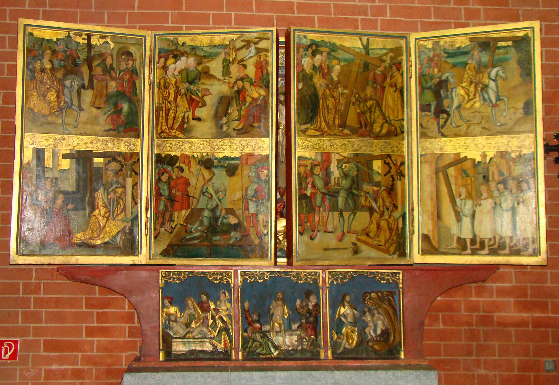 So genannter Nonnenaltar in der Klosterkirche Rostock, Alltagsseite mit Szenen aus der Legende vom heiligen Kreuz.